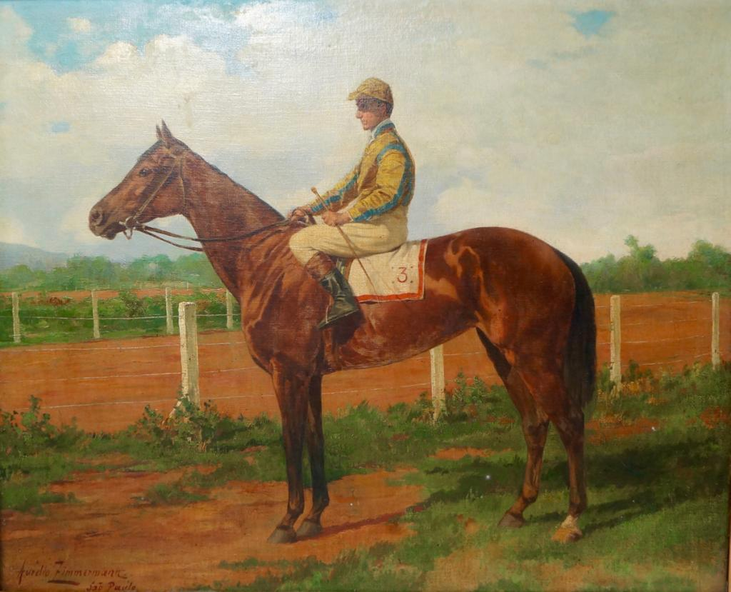 Aurélio Zimmermann - Jockey, s.d. Óleo sobre tela, 70 x 86 cm. Acervo do Jockey Club de São Paulo.